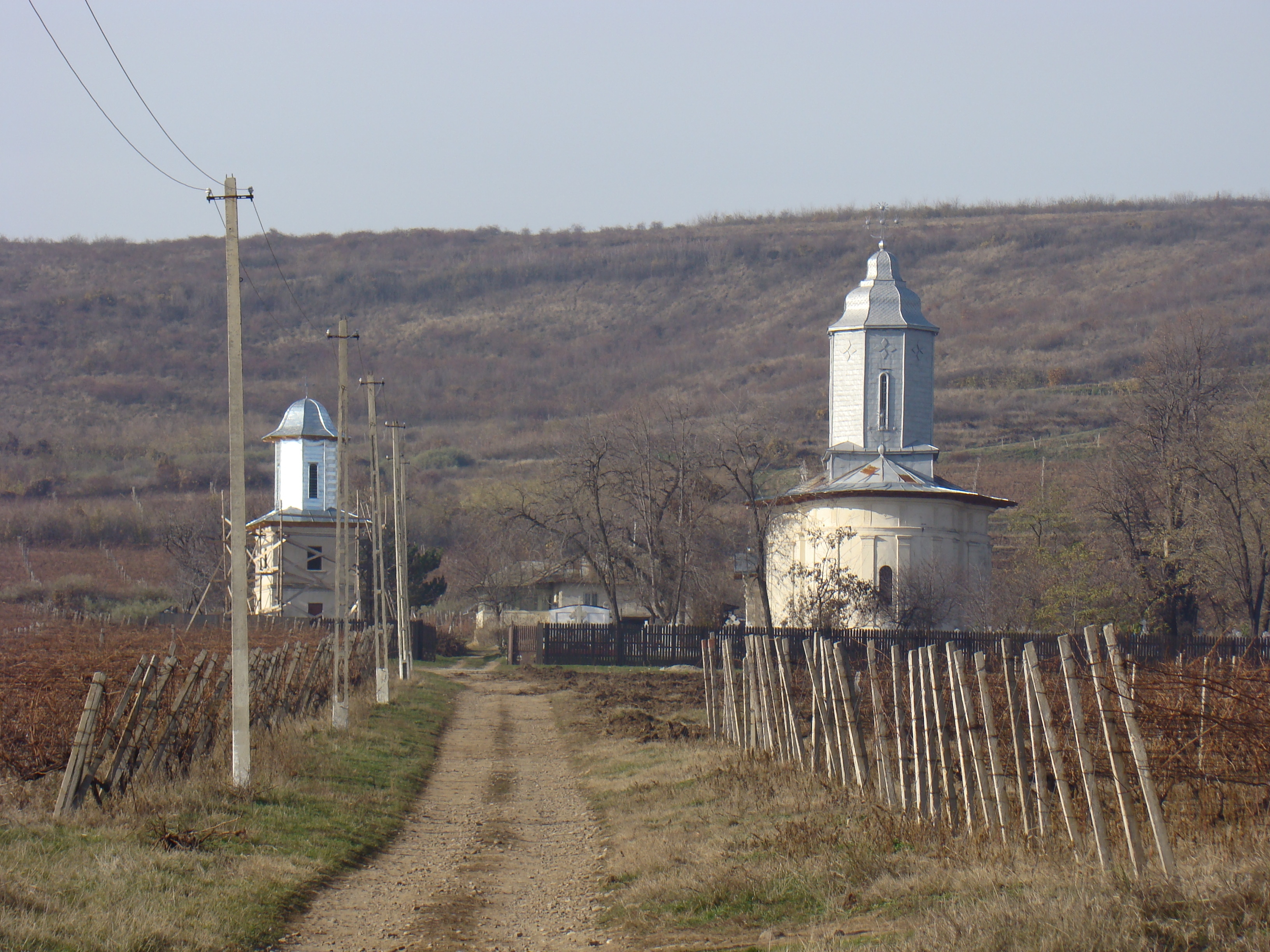 Ansamblul bisericii Sf. Ioan Sasenii Noi, Buzau, Romania